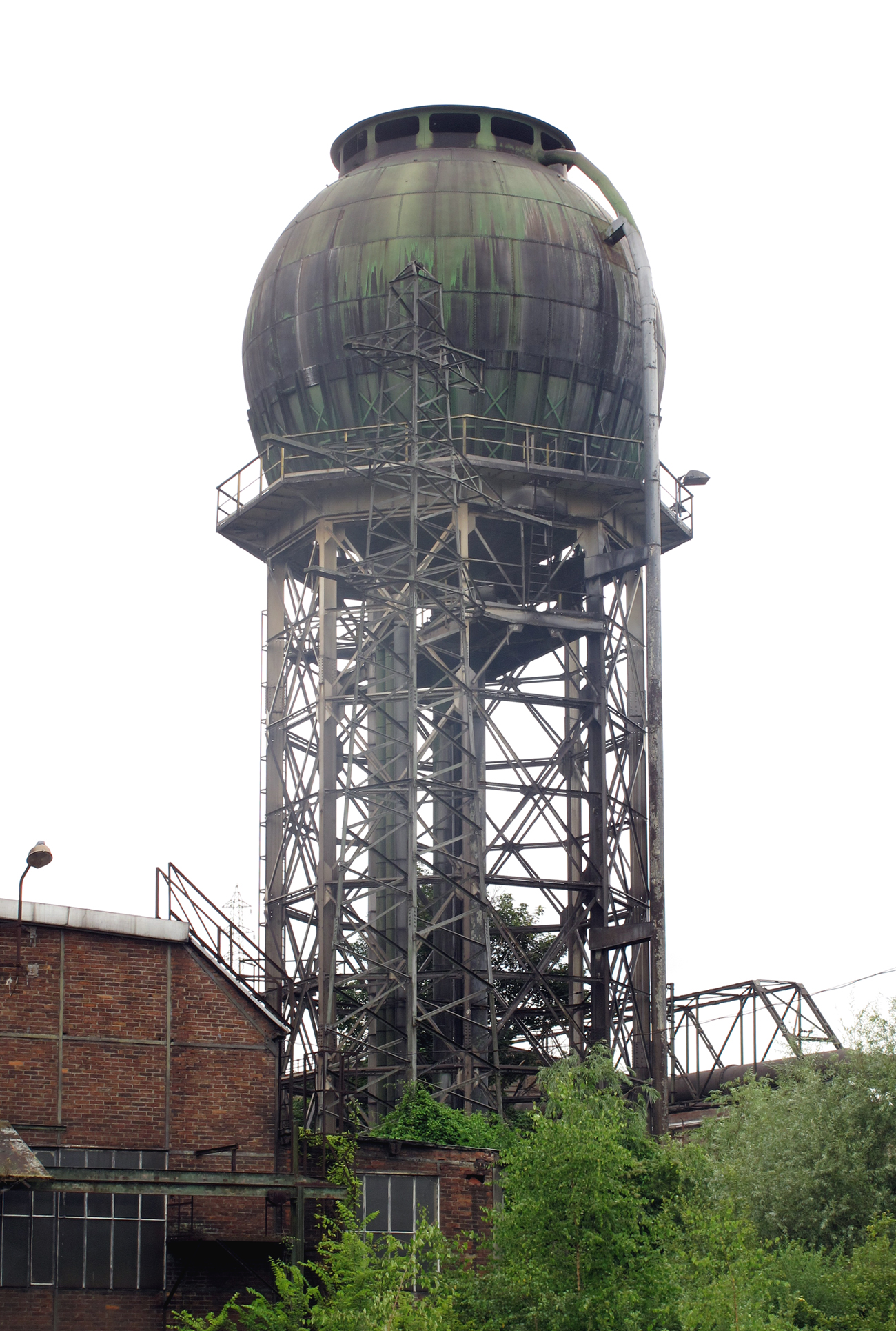 Alter Wasserturm der ArcelorMittal Schifflange, Luxemburg